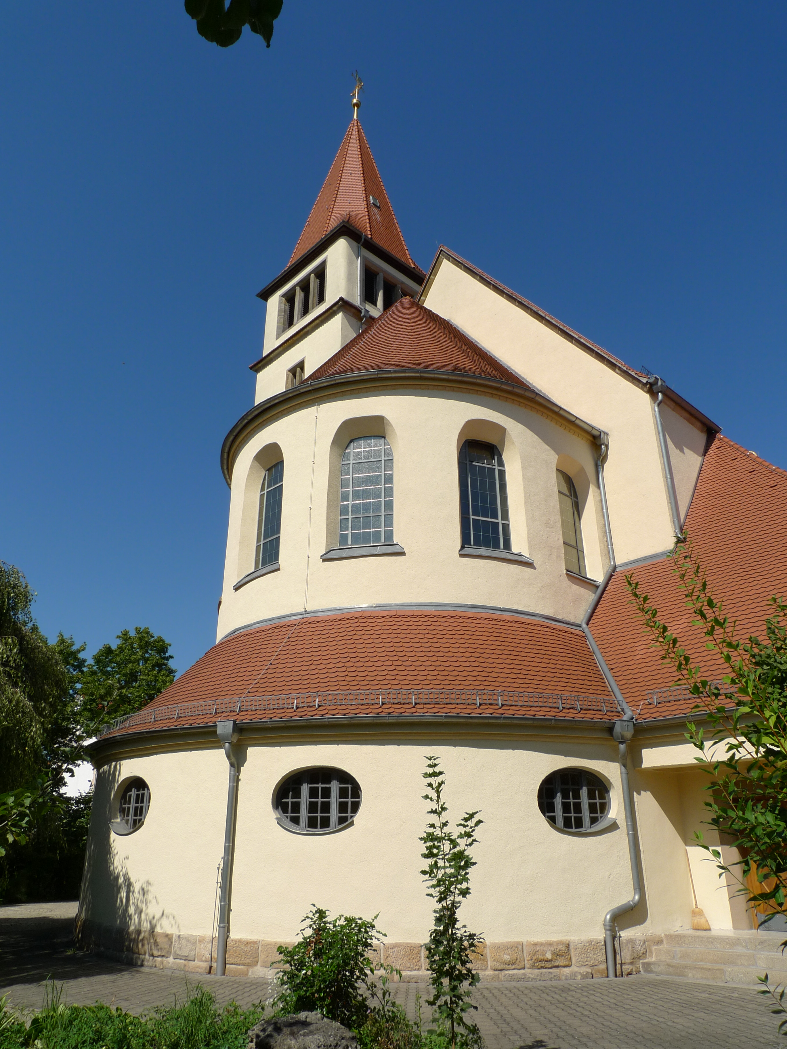 Katholische Pfarrkirche St. Stephanus in Adelsdorf.